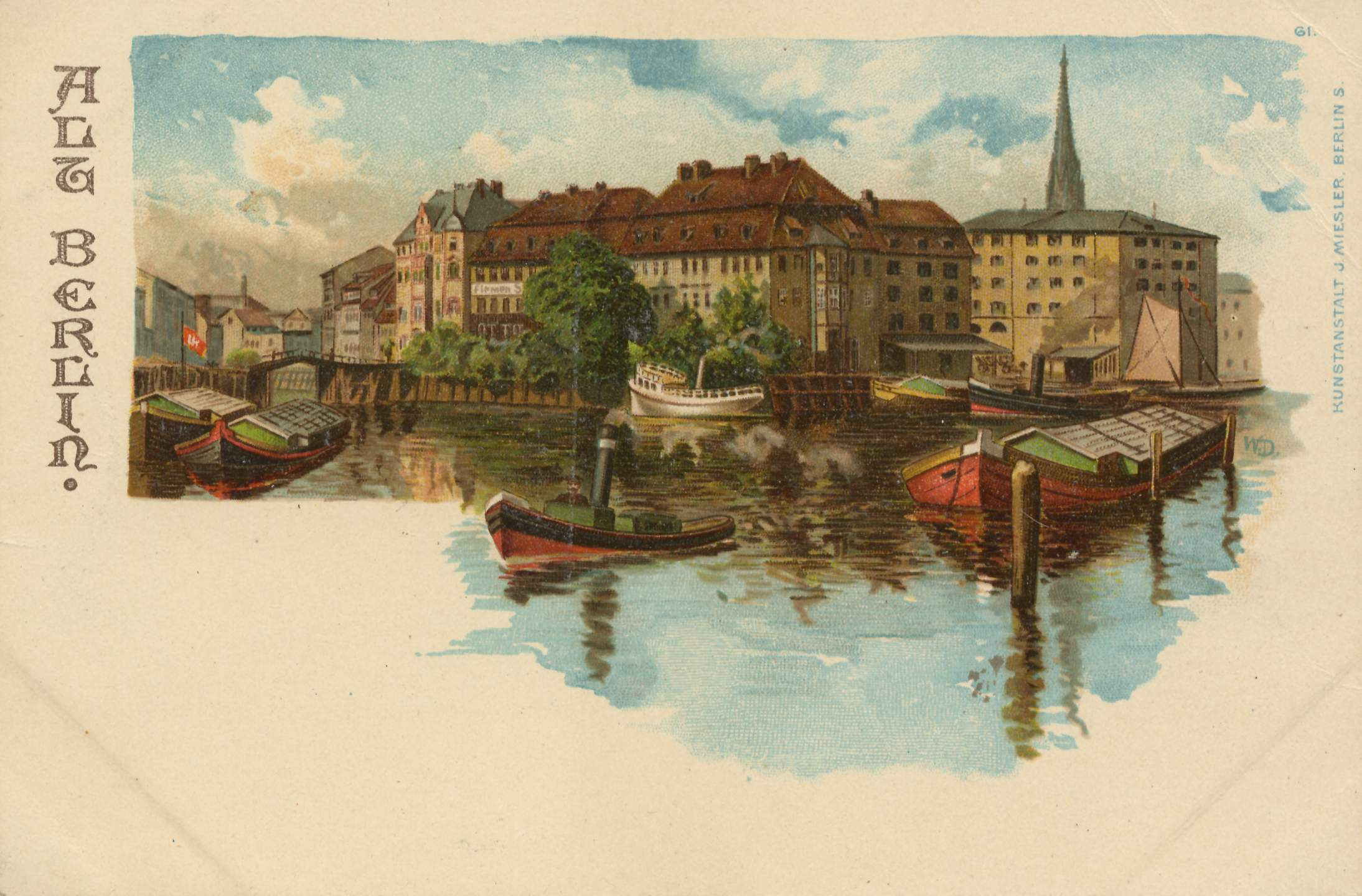 Alt-Berlin